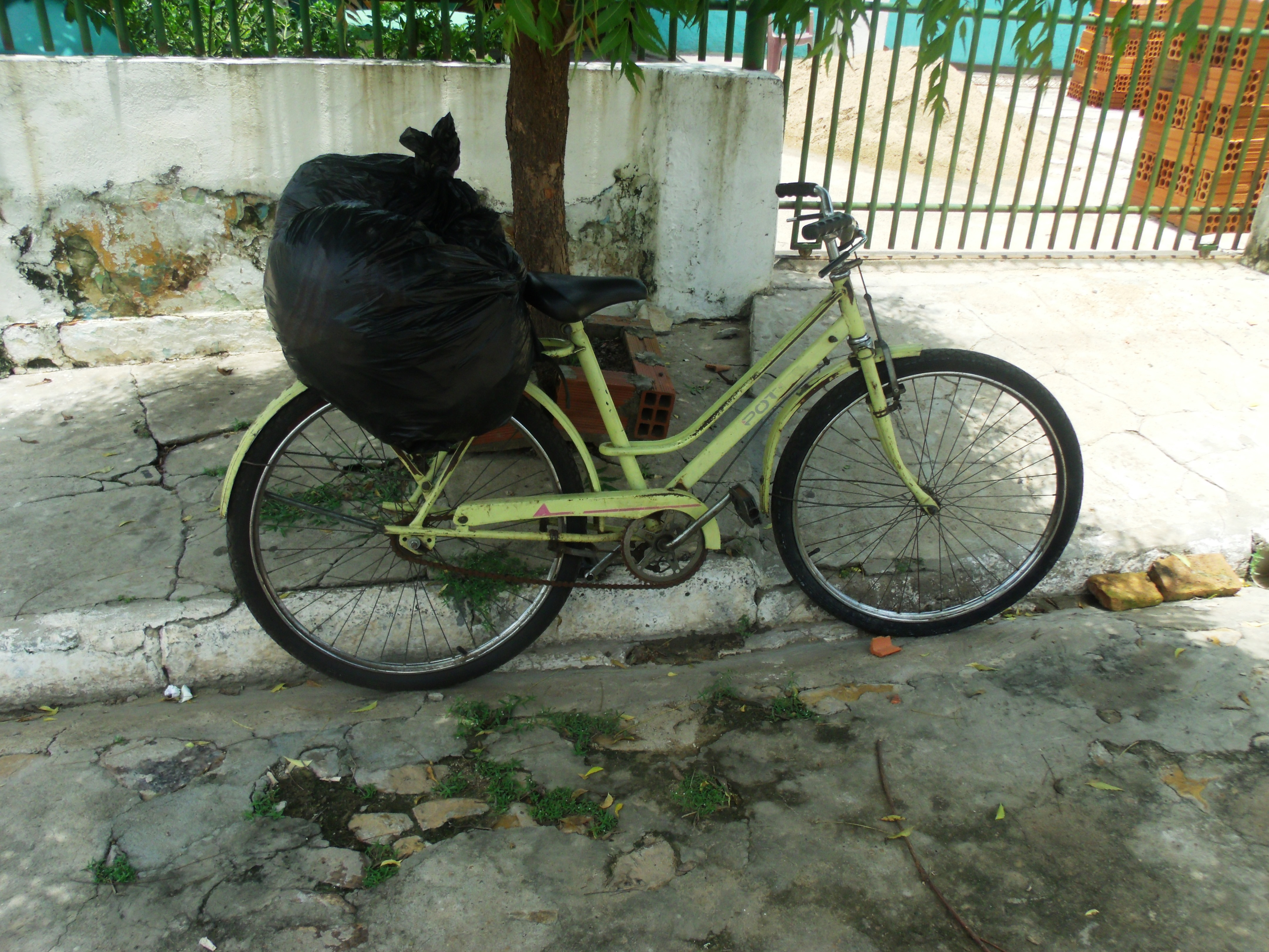 Uma bicicleta Calou, modelo poti, de mulher com a garupa carregada.